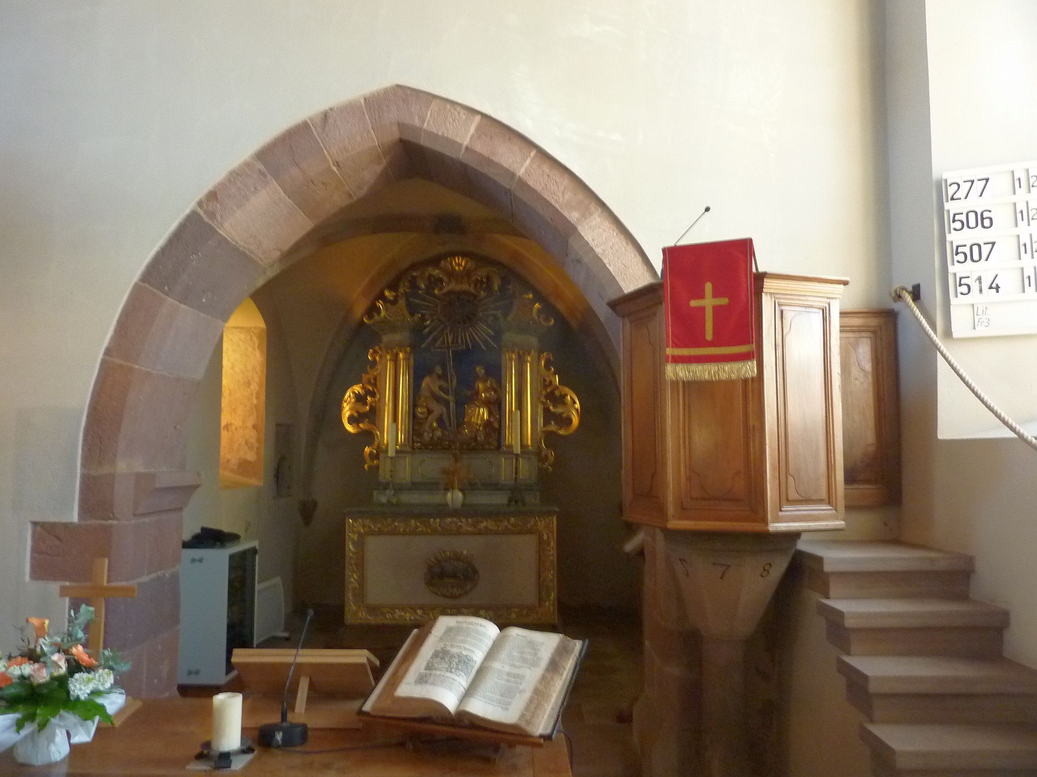 Église Saint-Jean (Goxwiller)